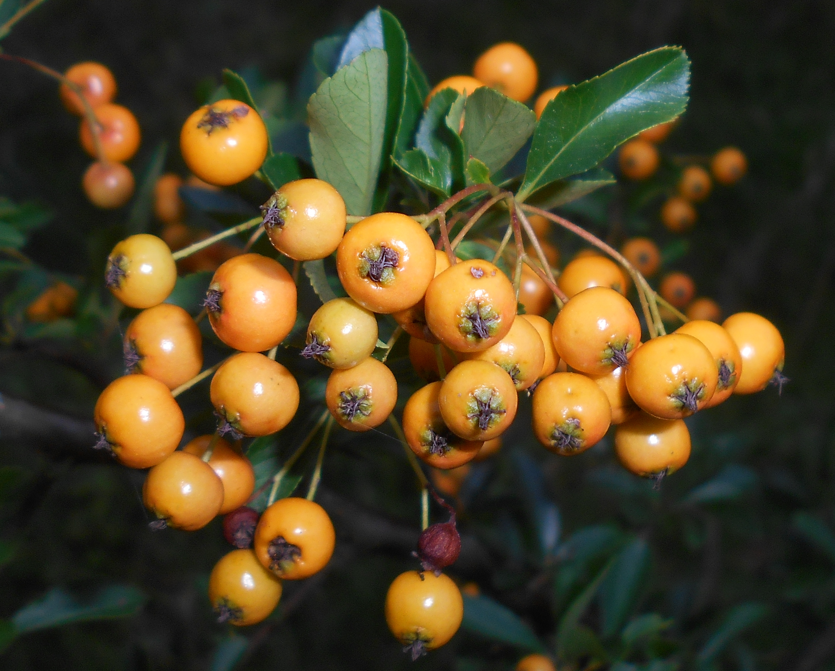 Ognik szkarłatny (Pyracantha coccinea).